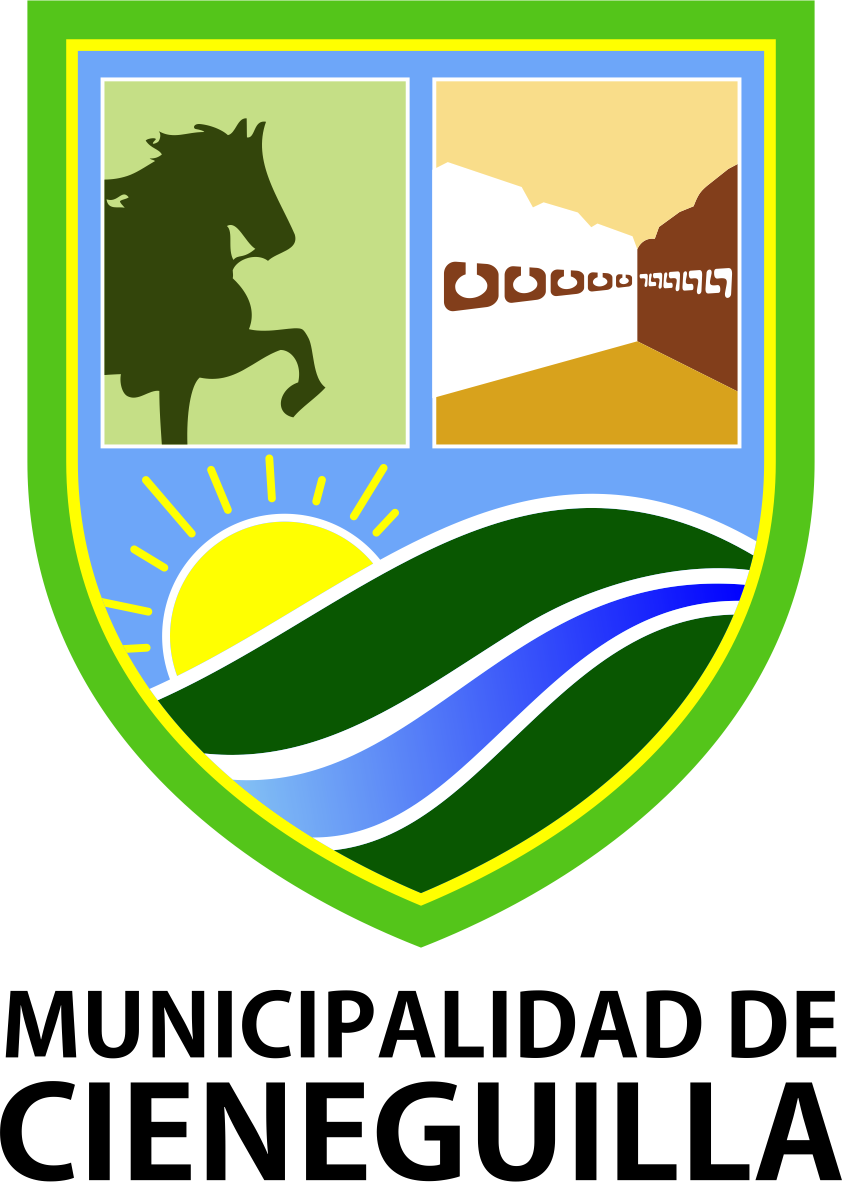 Distrito de Cieneguilla - Provincia de Lima - Región Lima